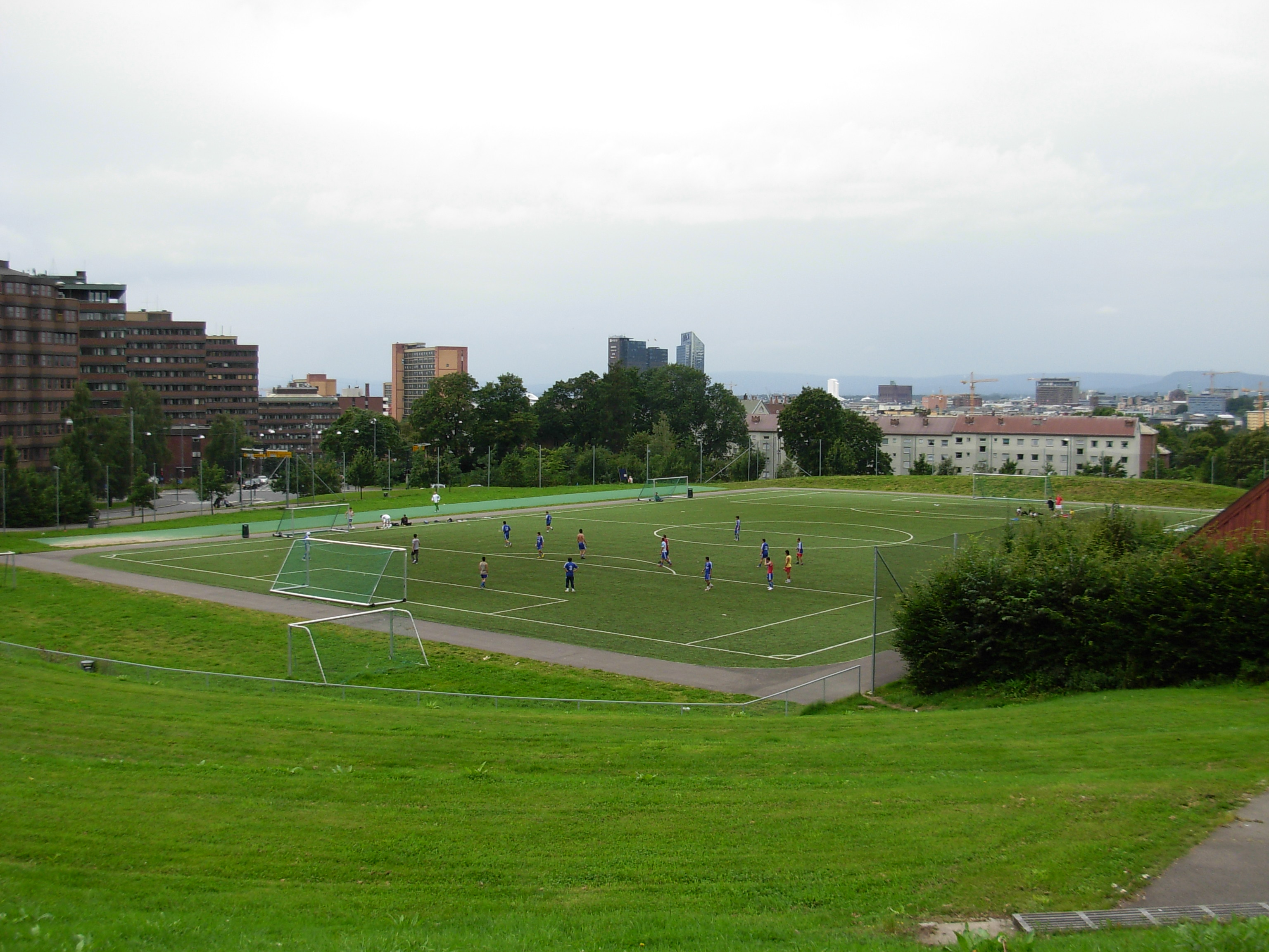 Caltexløkka, Tøyenparken, Oslo